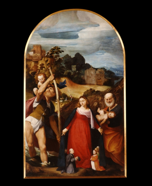 Il Pordenone - Madonna della Misericordia olio su tela anno: 1515-1516 Duomo di Pordenone